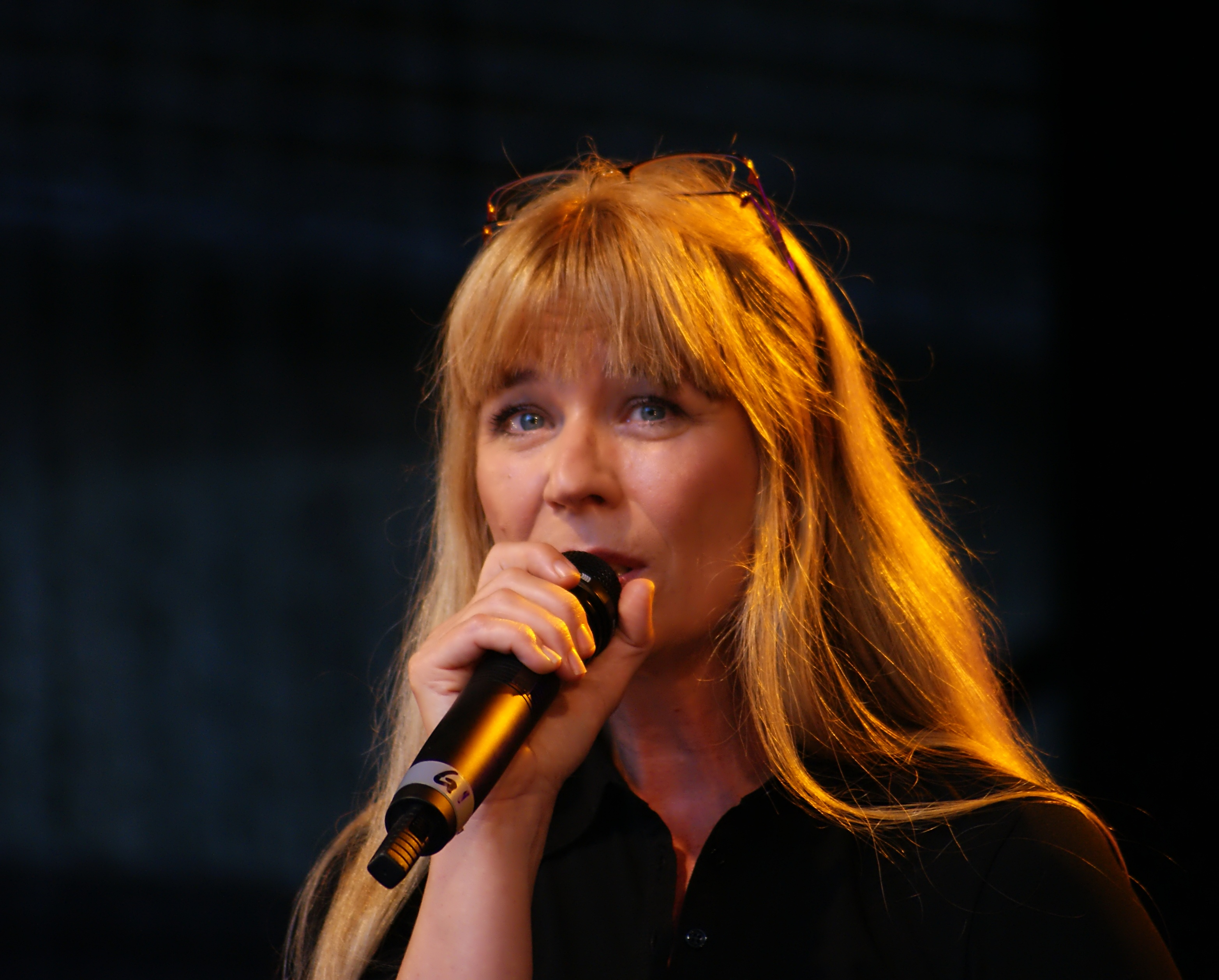 Catherine Hansson på Stockholms Kulturfestival 2010